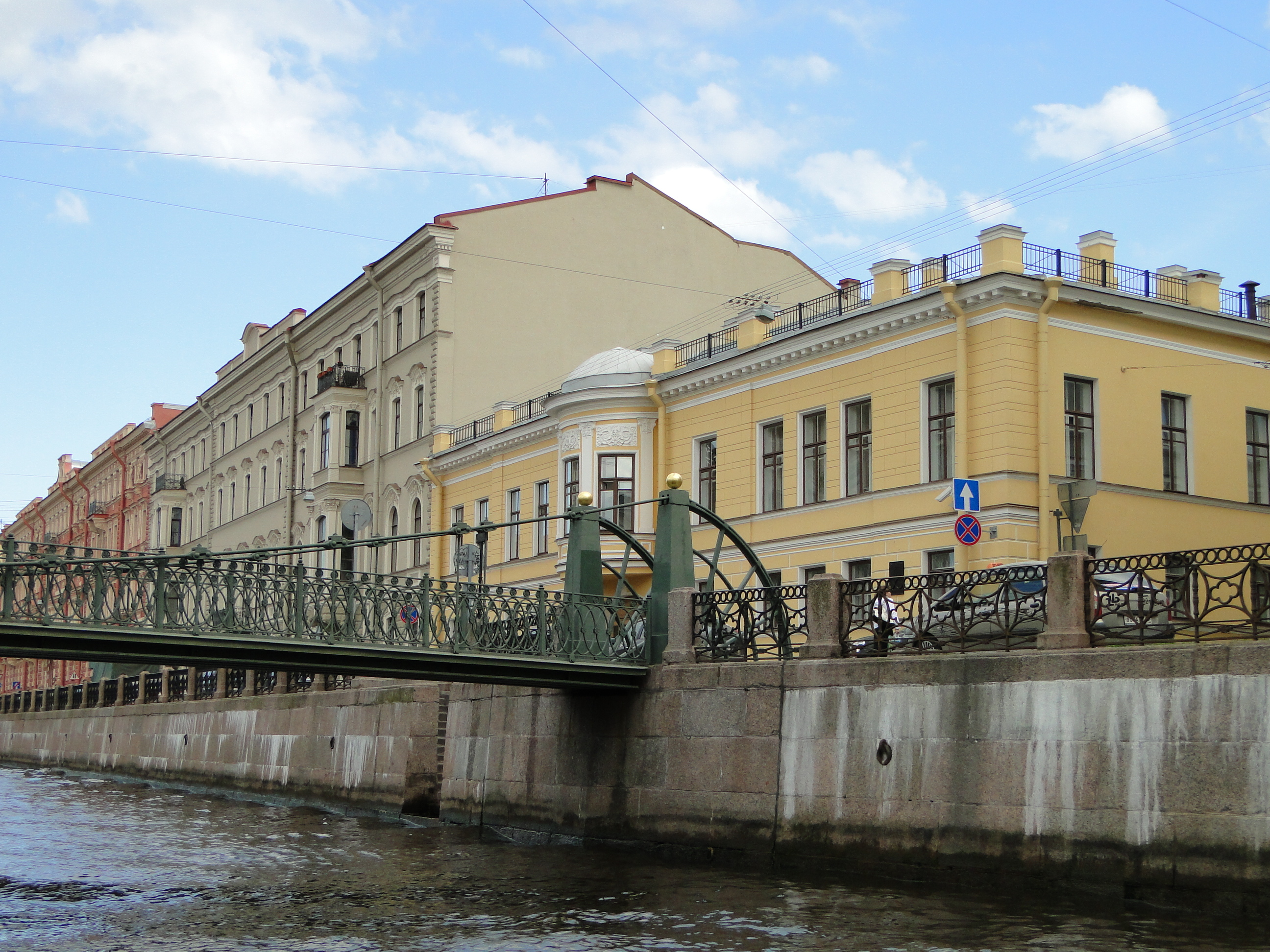 Набережная р. Мойки. Почтамтский мост